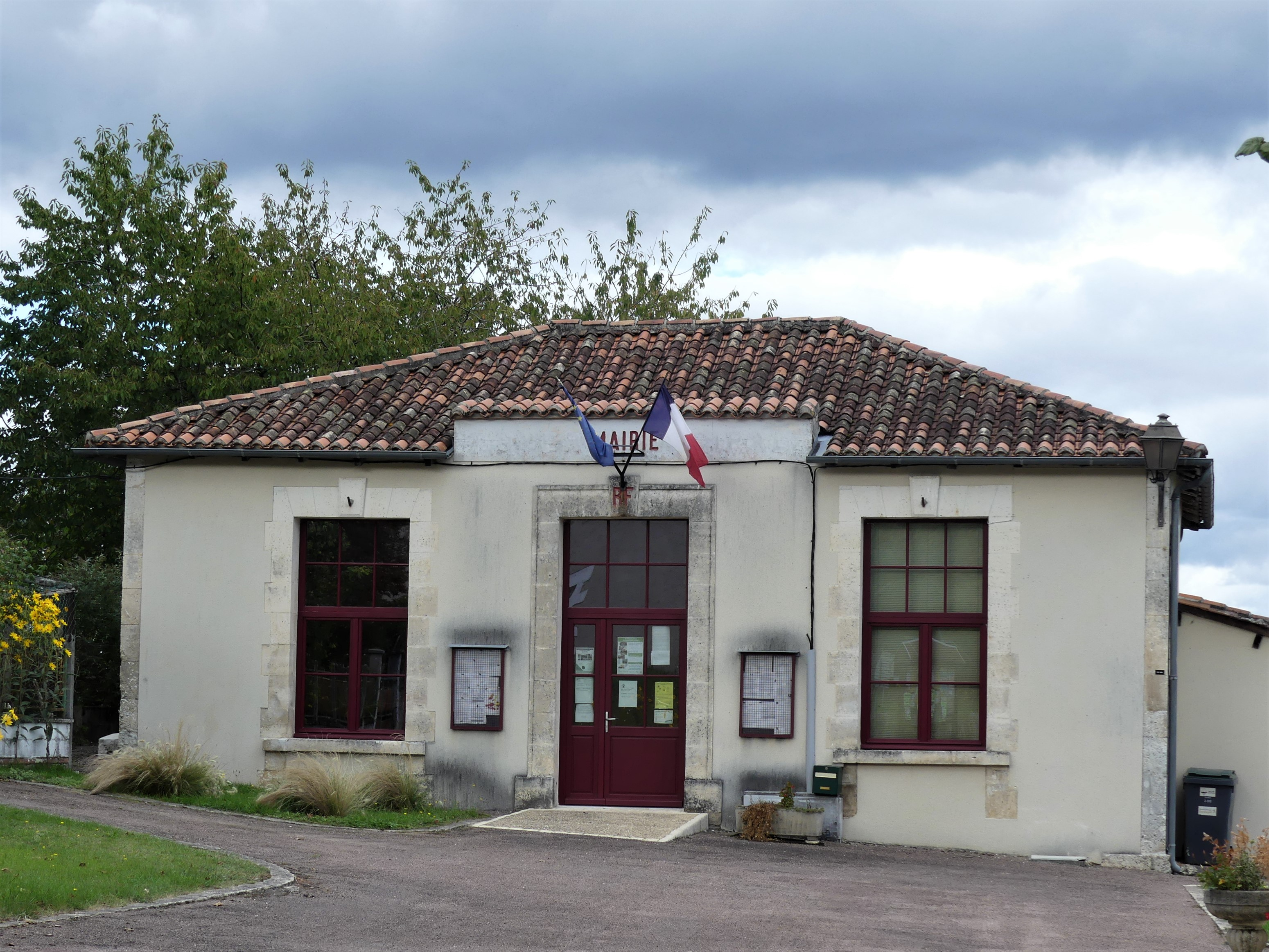 La mairie déléguée de Puyrenier, commune nouvelle de Mareuil en Périgord, Dordogne, France.